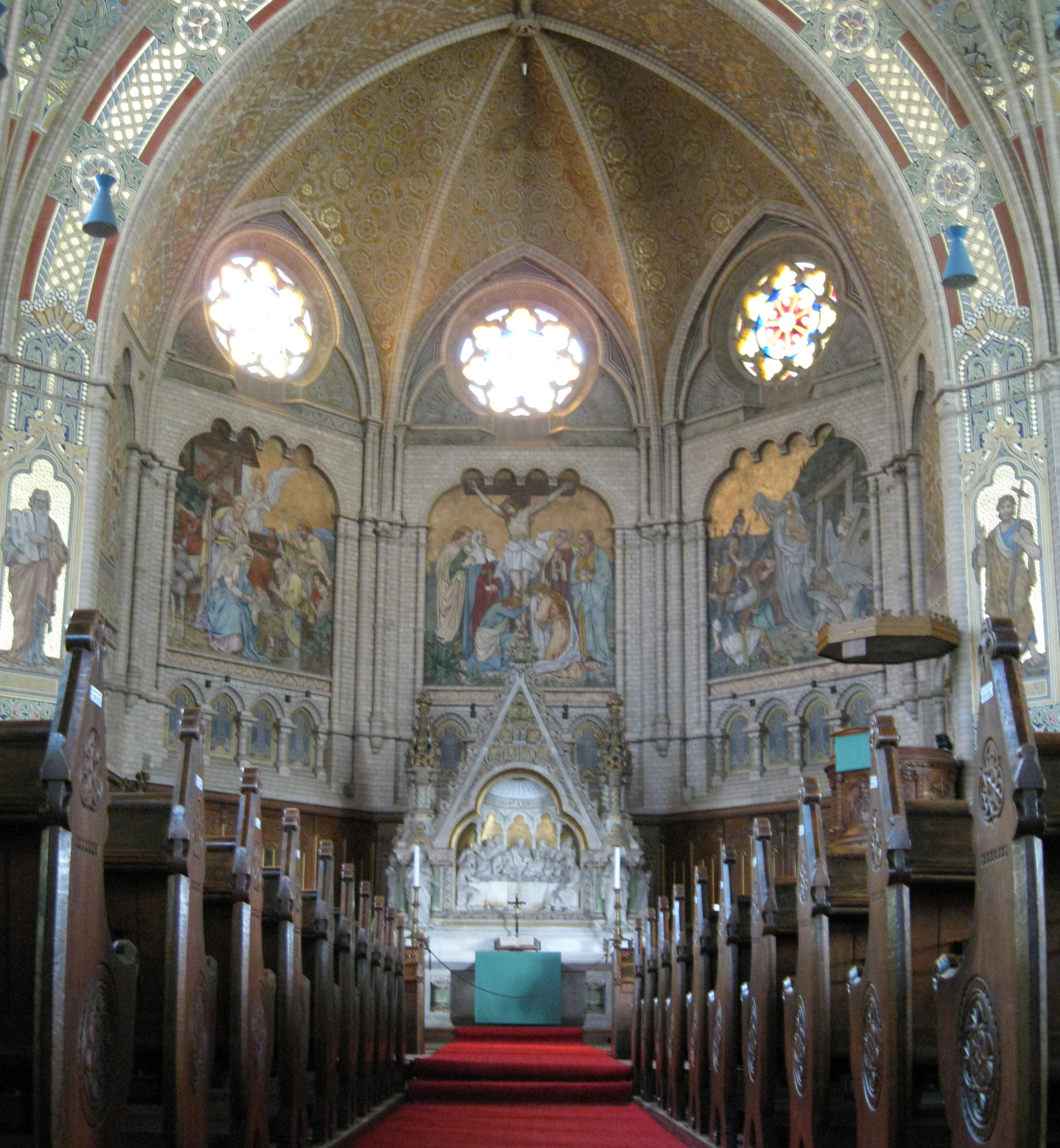 Chor der vor über 100 Jahren erbauten Brüderkirche in Altenburg